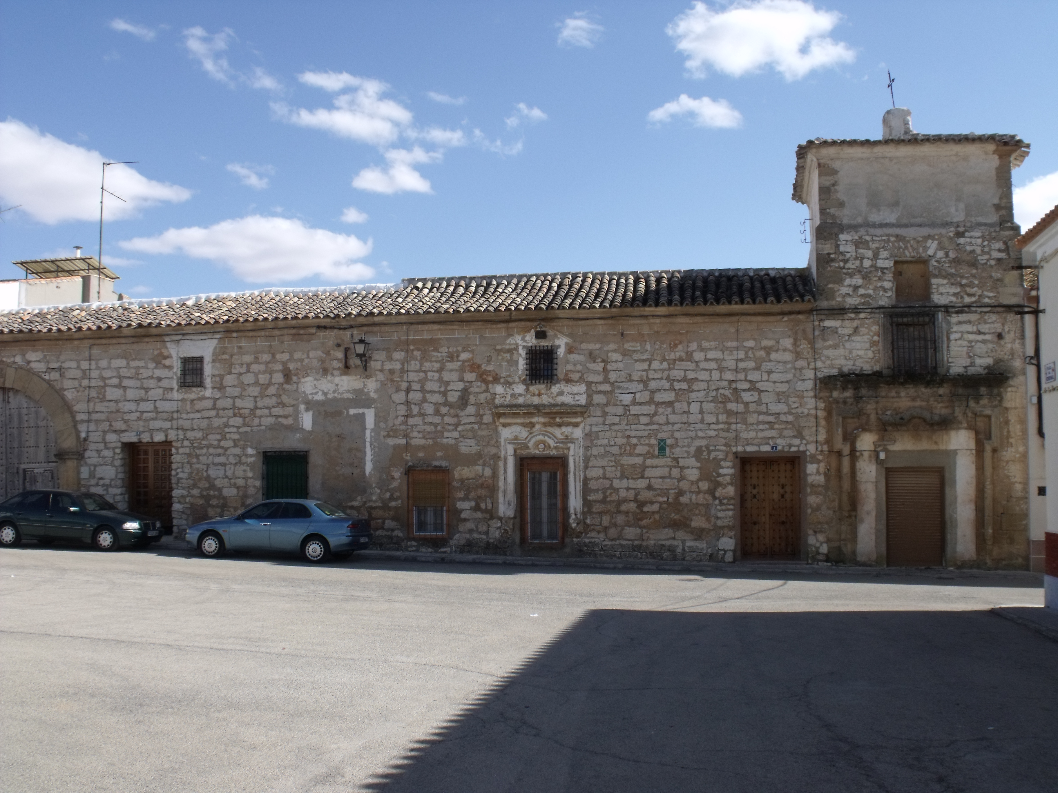 Antiguo convento de los Trinitarios, en la Plaza del Verdinal, Mota del Cuervo. En el momento de tomarse la fotografía (18-3-2012), el edificio se encontraba dividido en dos viviendas.